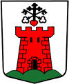 Wappen von Embd